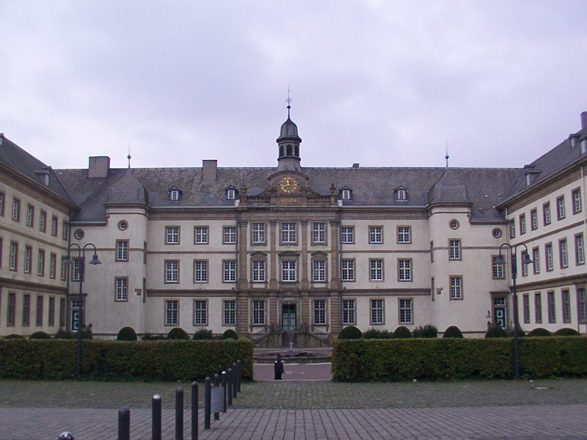 Büren (Westfalen): ehemaliges Jesuitenkolleg, heute Mauritiusgymnasium.